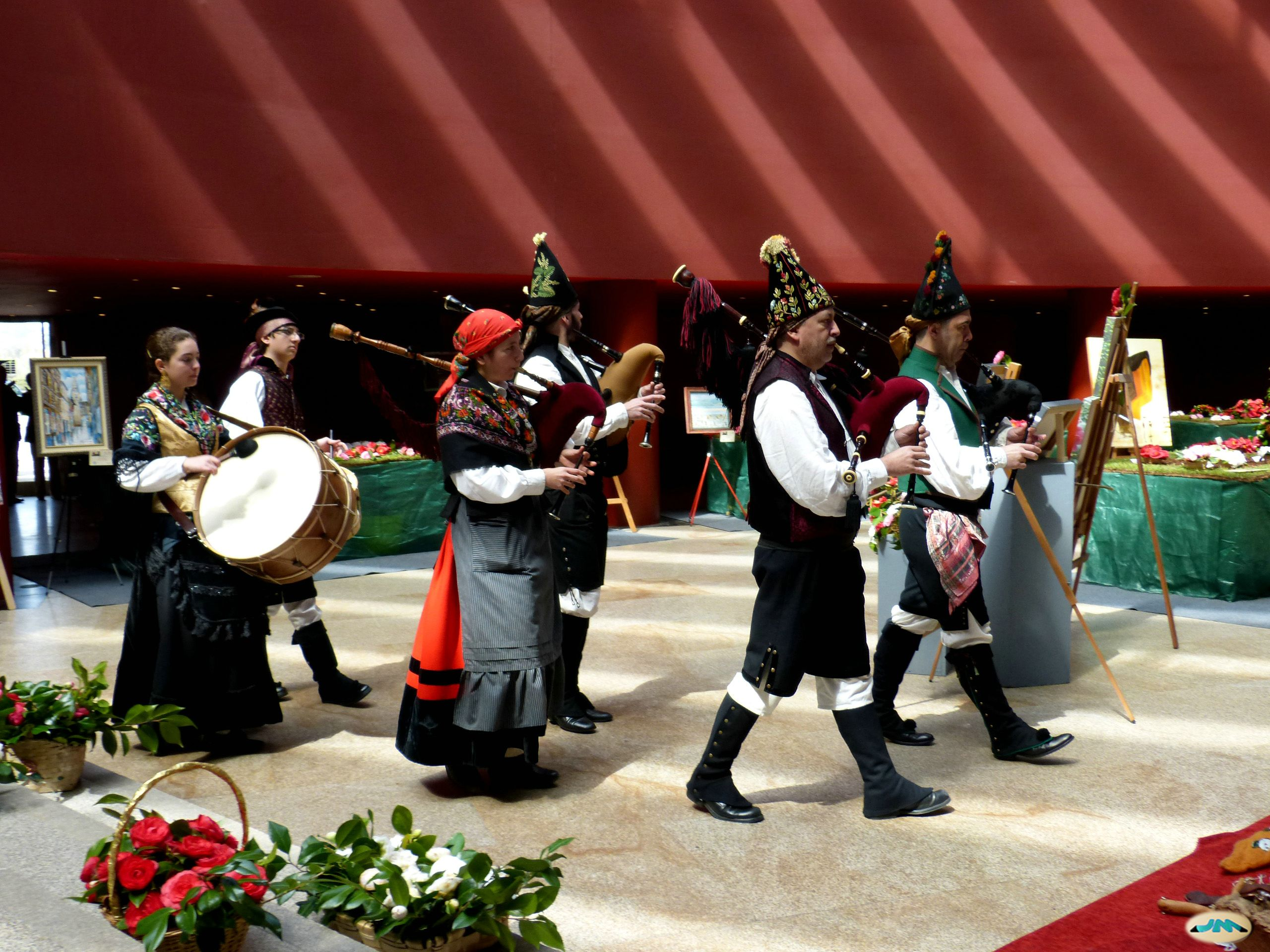 Pontevedra-Gala de Camelias en el Camino portugués